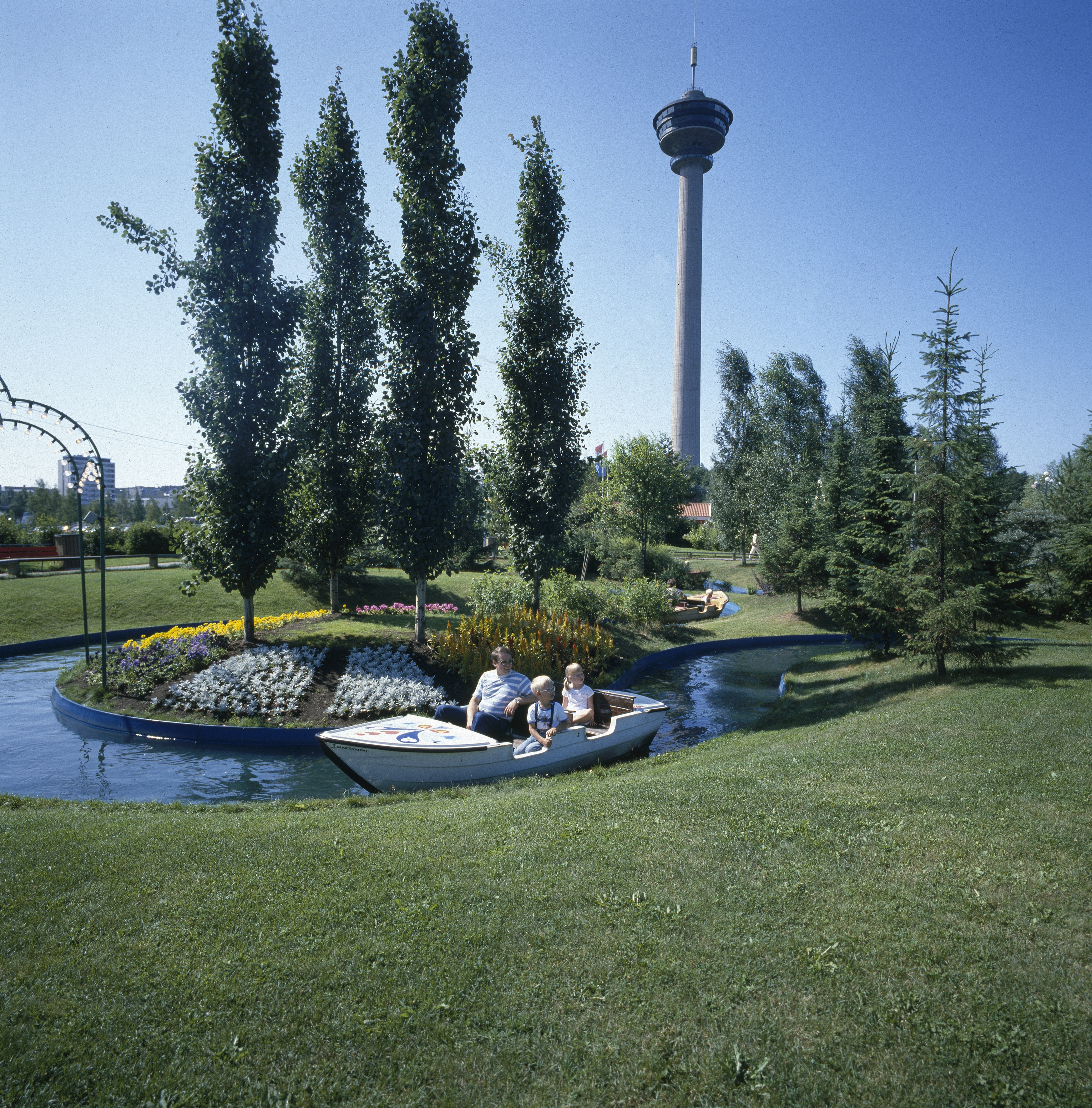 ”Taikajoki”-niminen huvipuistolaite Särkänniemessä Tampereella. Taustalla Näsinneula.